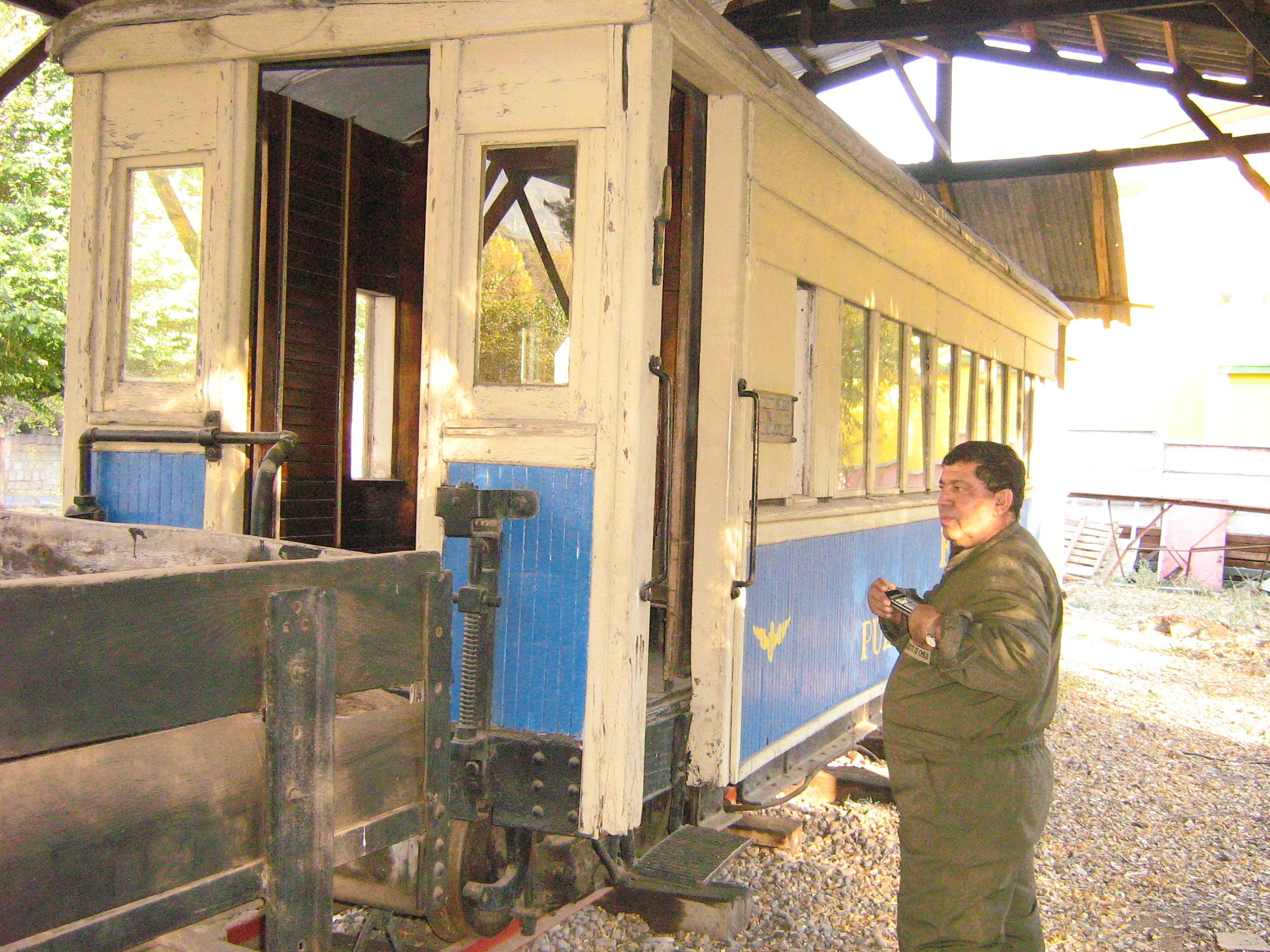 Luis Leon y un coche de pasajeros remodelado como coche bar comedor